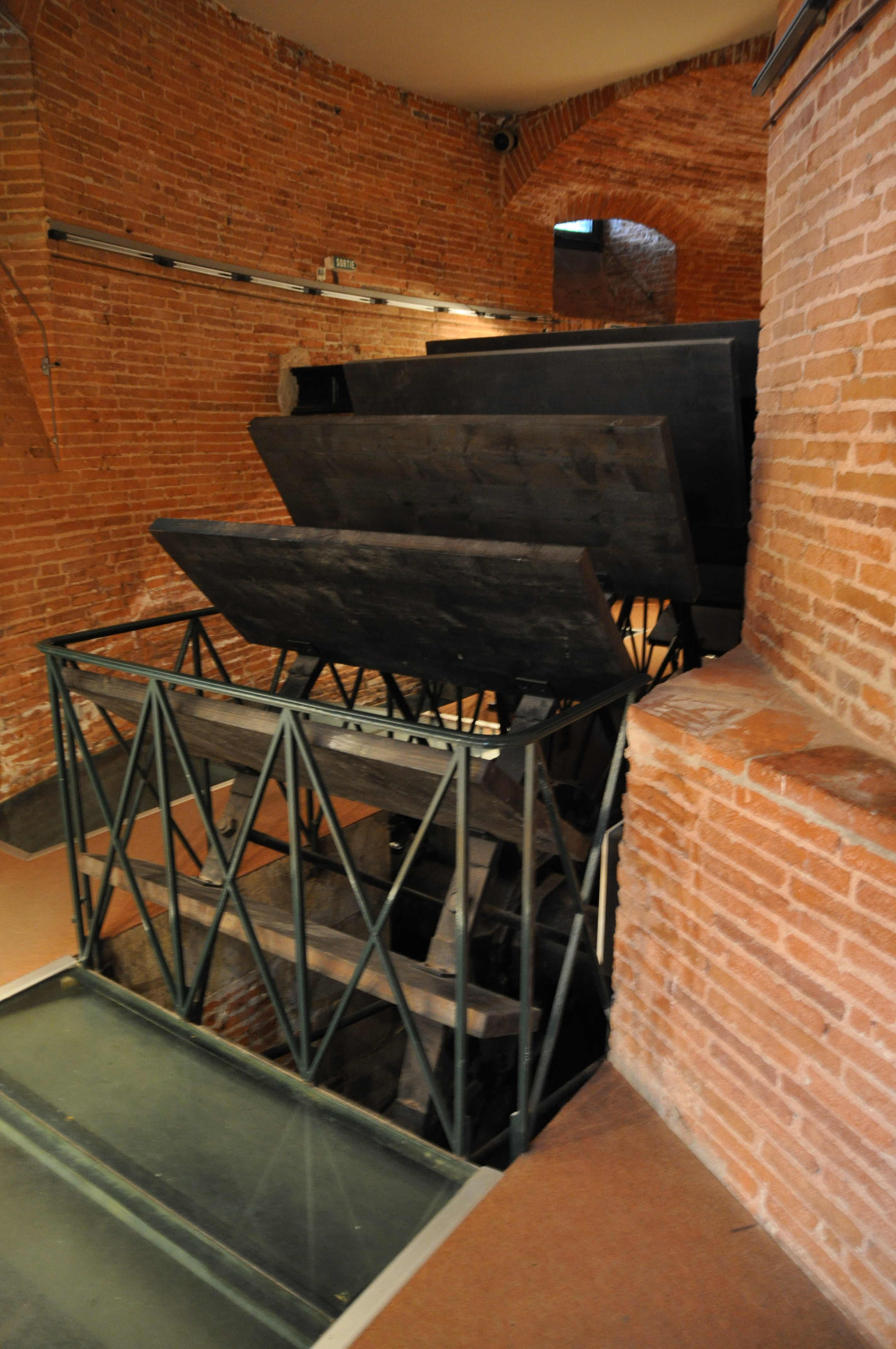 Château d'eau Laganne JEP 2013 .